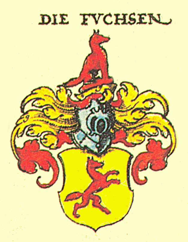 Wappen der Fränkischen Adelsfamilie Fuchs (Fuchs von Bimbach, etc.)